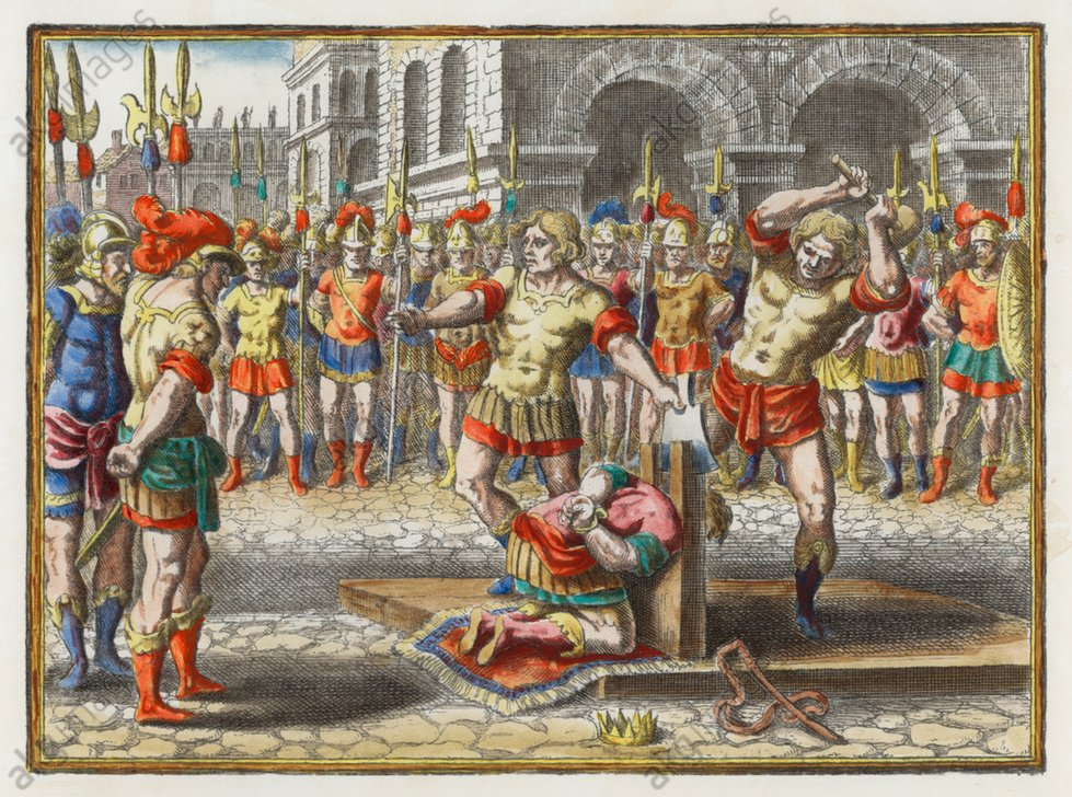 Amilcari das Haupt abgeschlagen